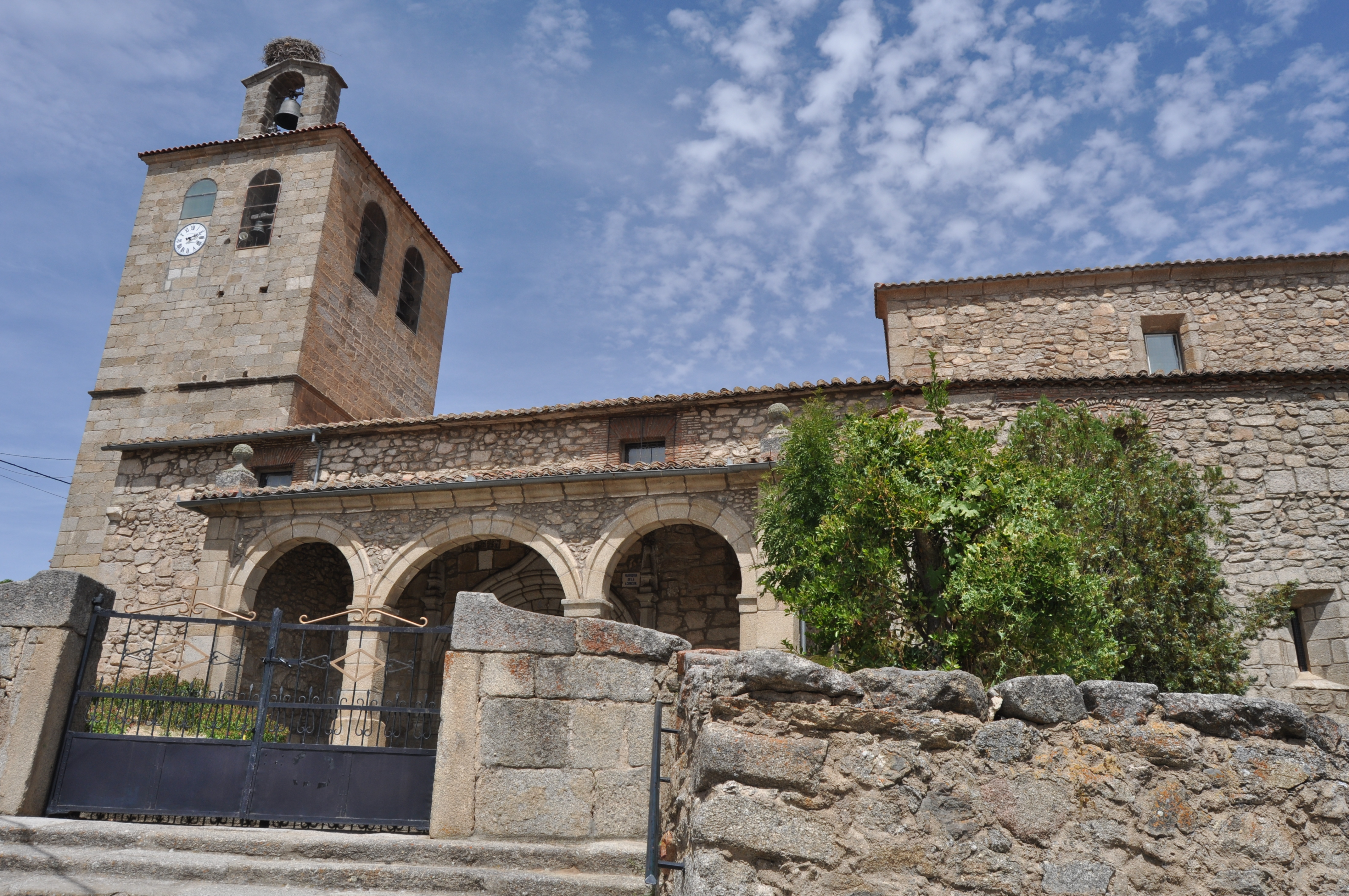 Puente del Congosto - 017